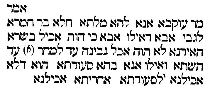 מאמר של מר עוקבא מתוך תלמוד בבלי, חולין קה ע"א